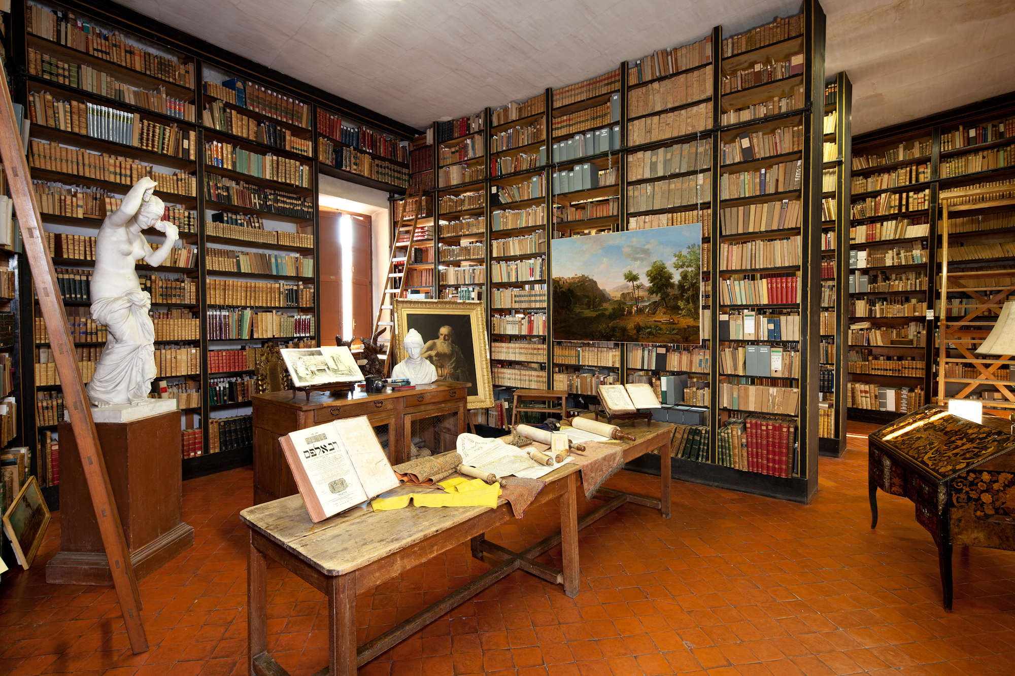 Bibliothèque Inguimbertine, manuscrits, Casimir Barjavel, Diogène, Comtadine, Judaïca, rouleau d'Esther, Torah. Musée Duplessis, musée Duplessis-Comtadin, Carpentras.